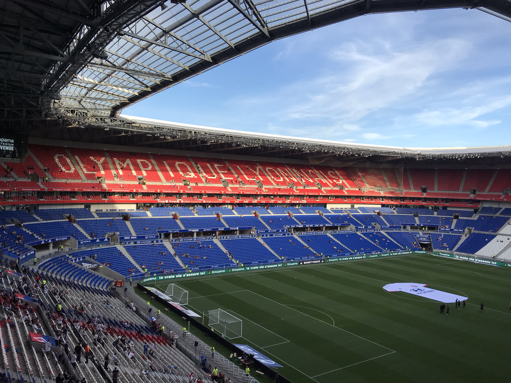 OL-Angers Groupama Stadium